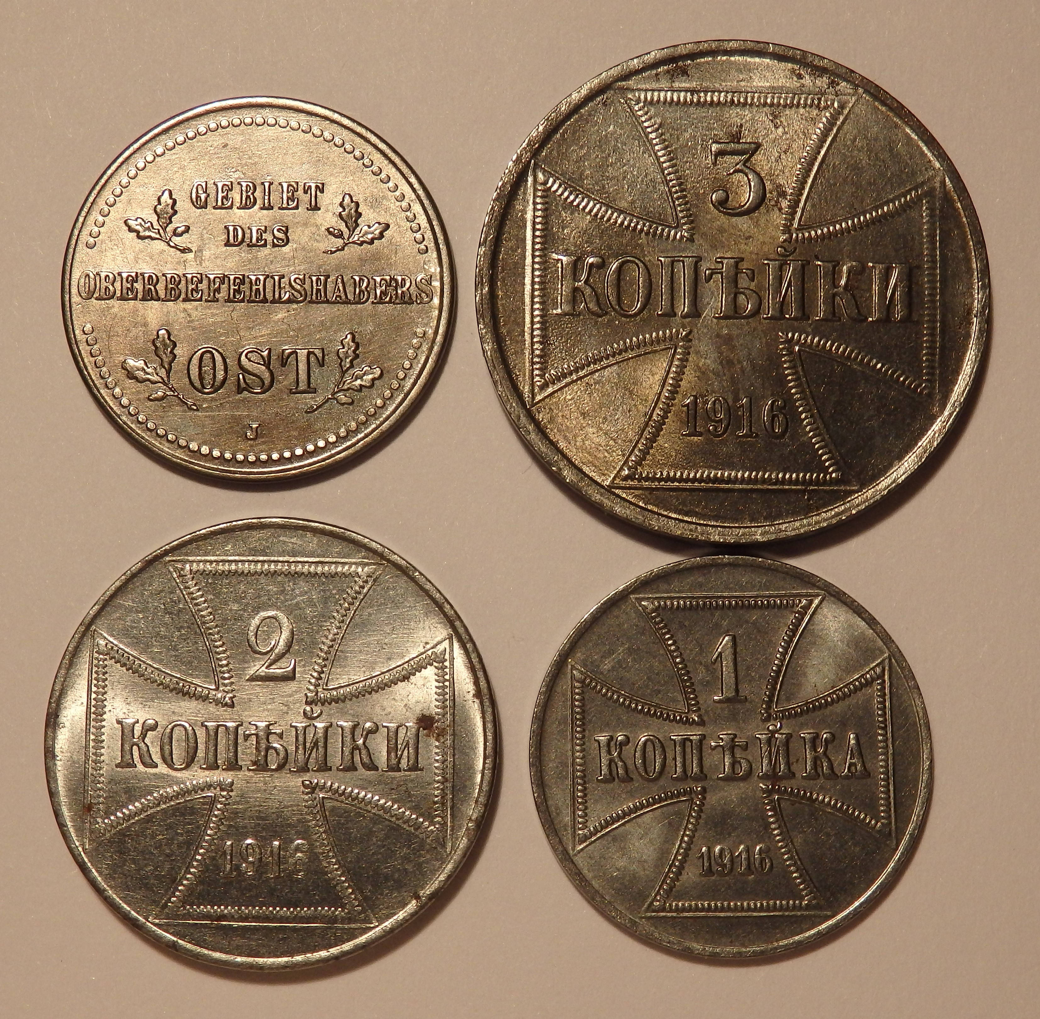 Rückseite 1 Kopeke, Wertseiten 3, 2 und 1 Kopeke Gebiet Oberbefehlshaber Ost